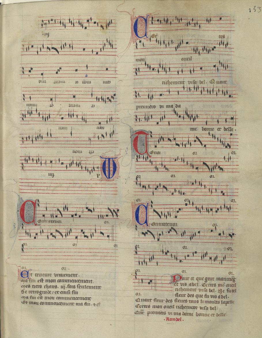 Paris, Bibliothèque Nationale, fonds français 22546